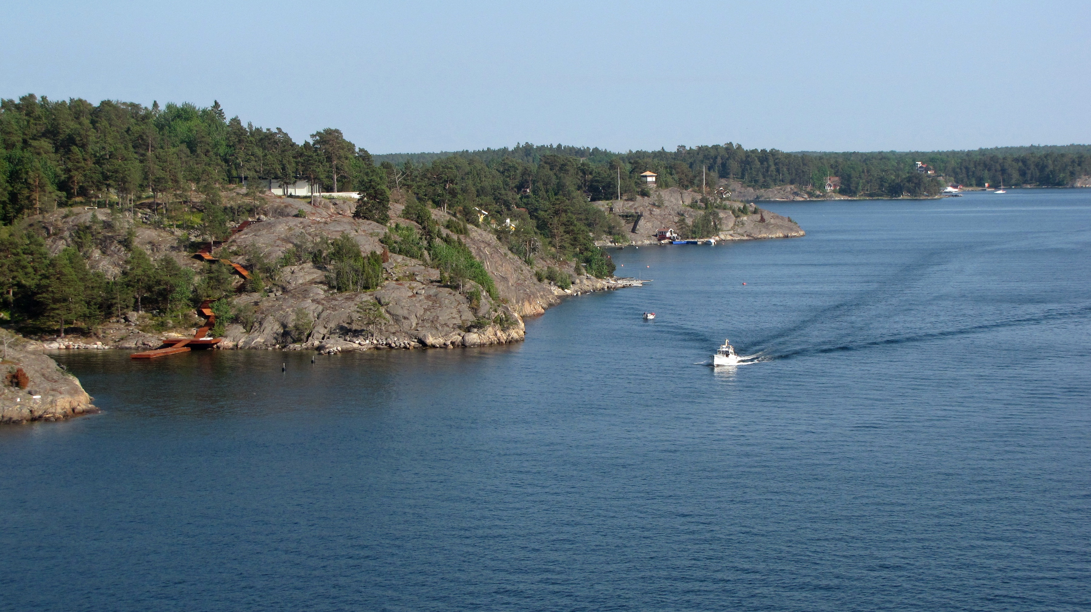 Panorama islands 3/ Панорама островов 3